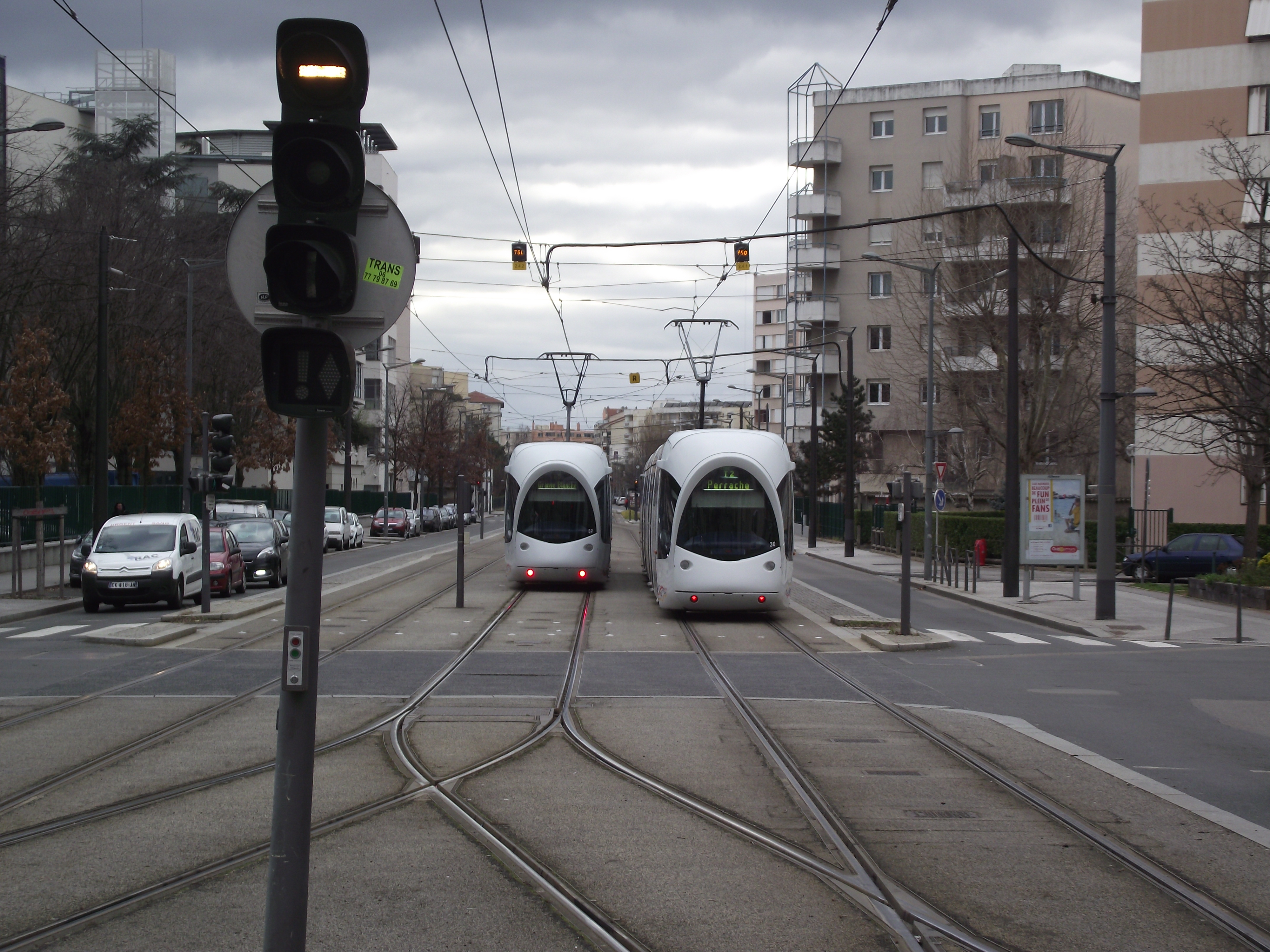 Keerspoor voor tramlijn 5 in gebruik bij Grange Blanche.